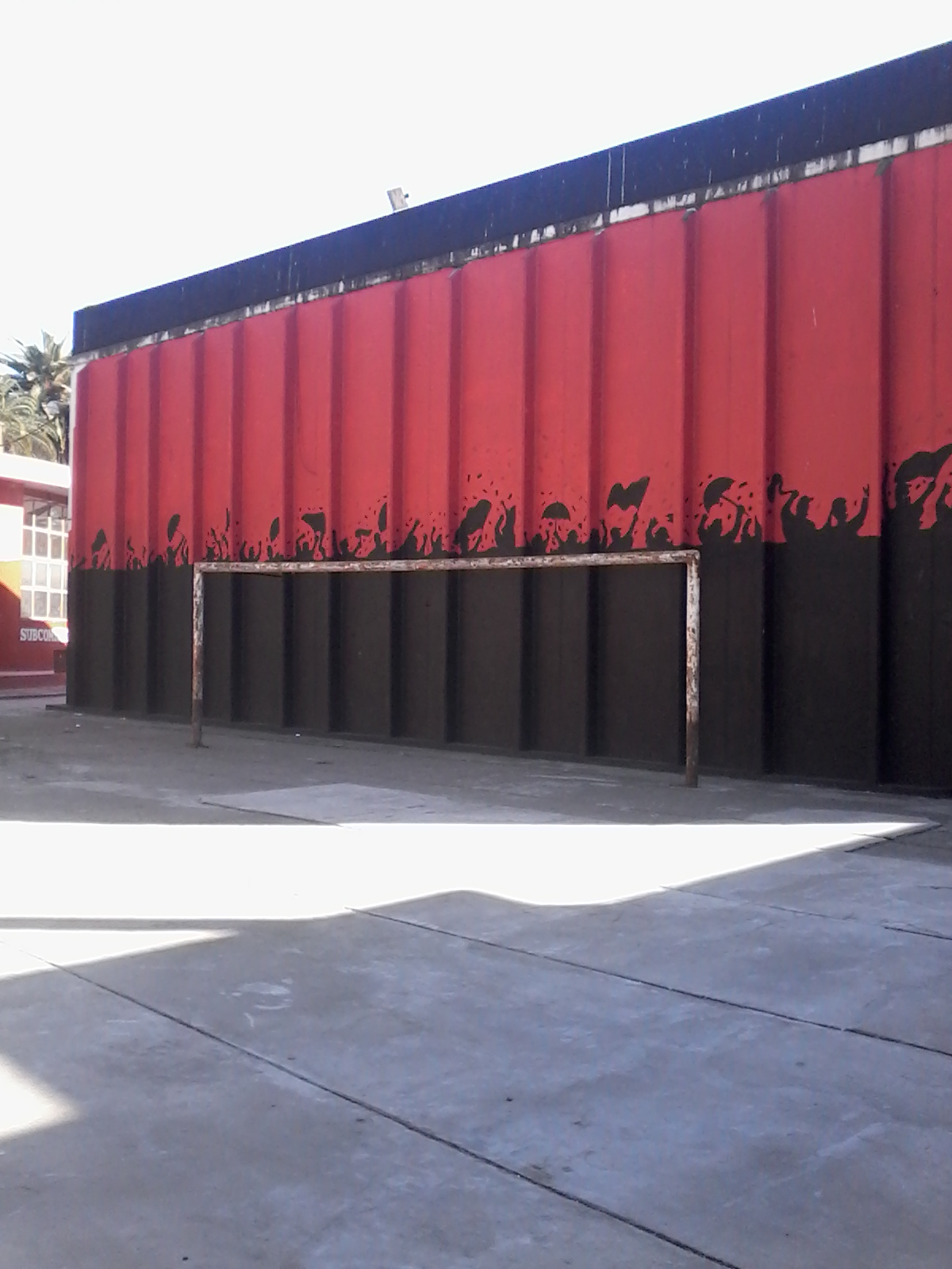 Arco histórico. Arco donde marco el gol Mario Zanabria a Rosario Central para consagrar a Newell's Campeón